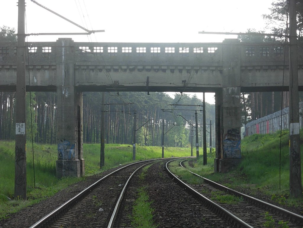 Stary wiadukt nad linią kolejową nr 18 i 131 w Bydgoszczy